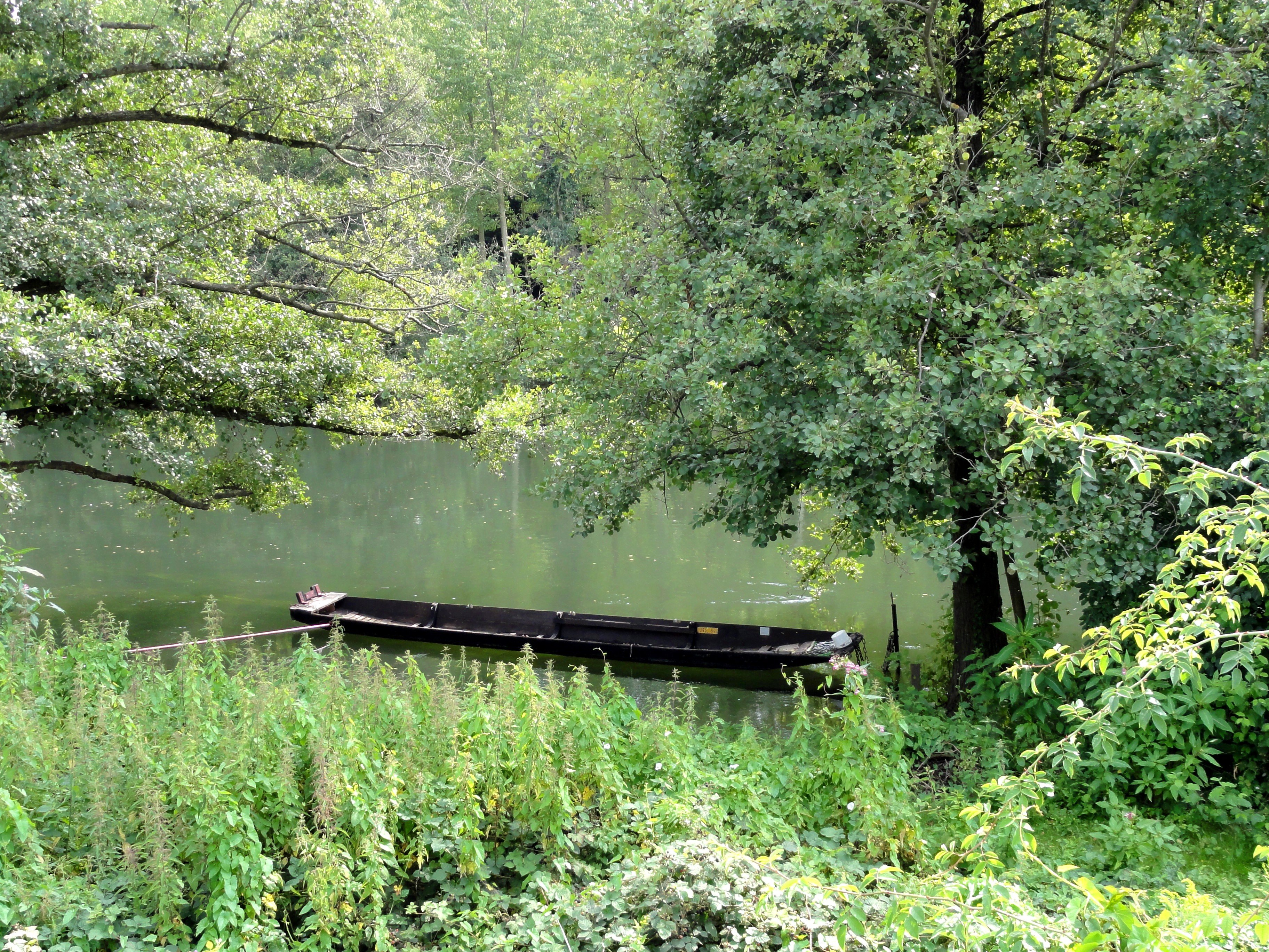 Alsace, Bas-Rhin, Ostwald, l'Ill.